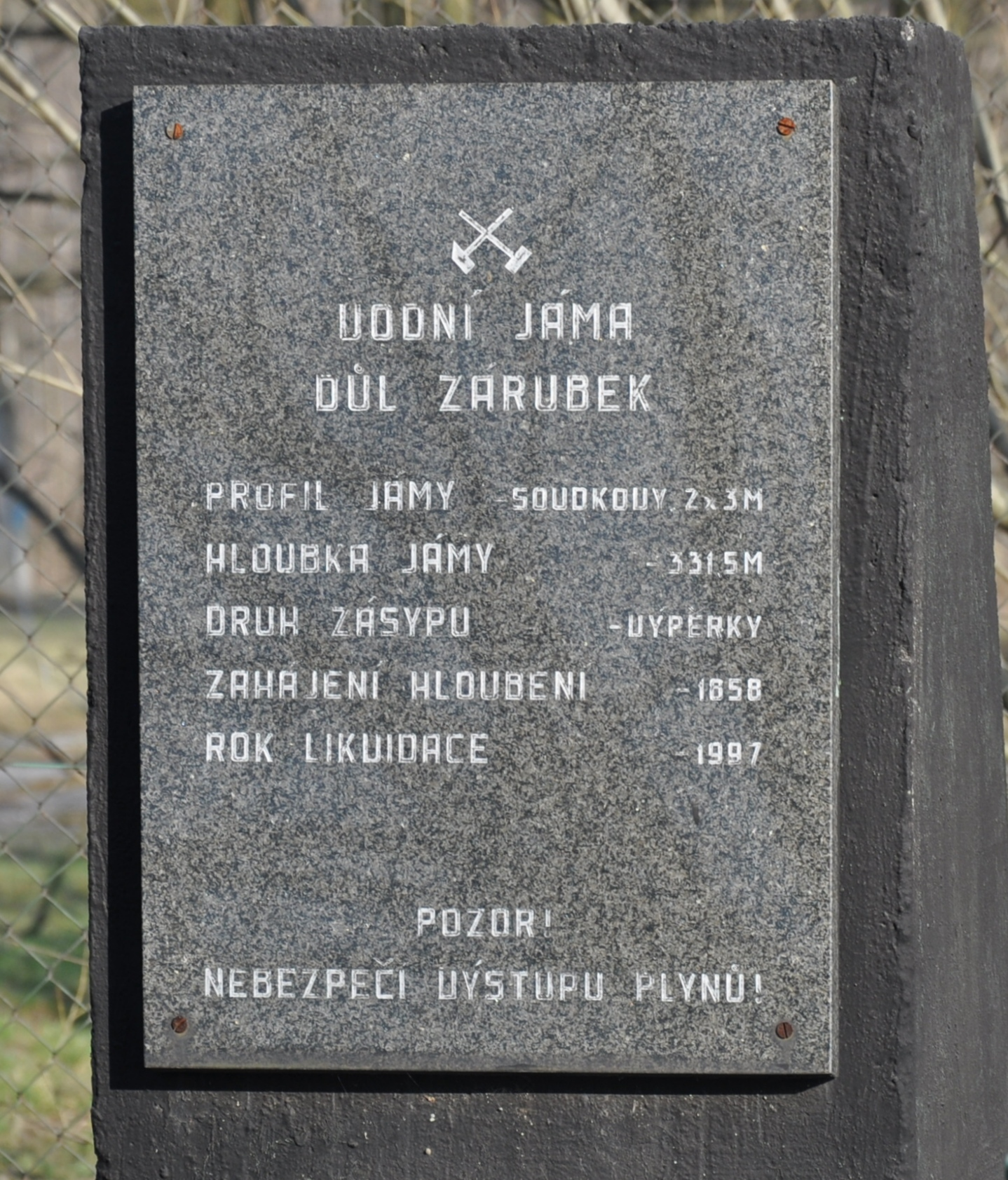 Pamětní deska s daty vodní jámy dolu Hermenegild/Zárubek.